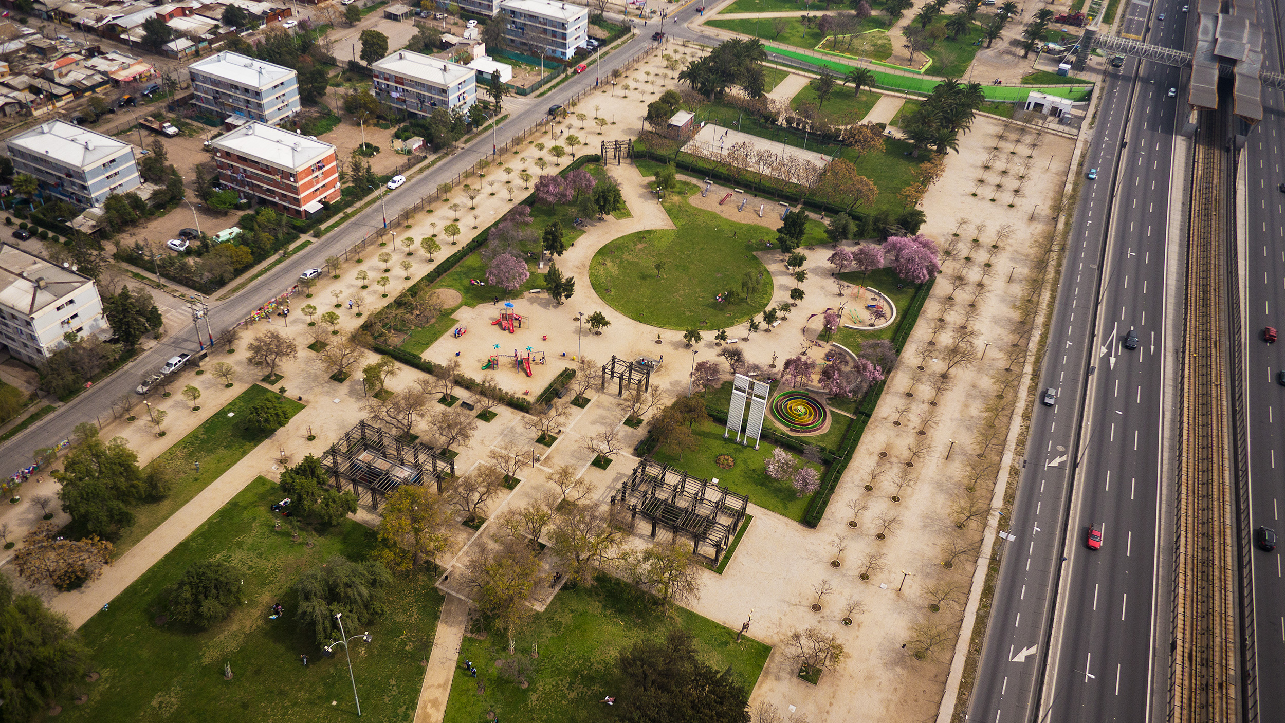 25-09-2013 Parque La Bandera